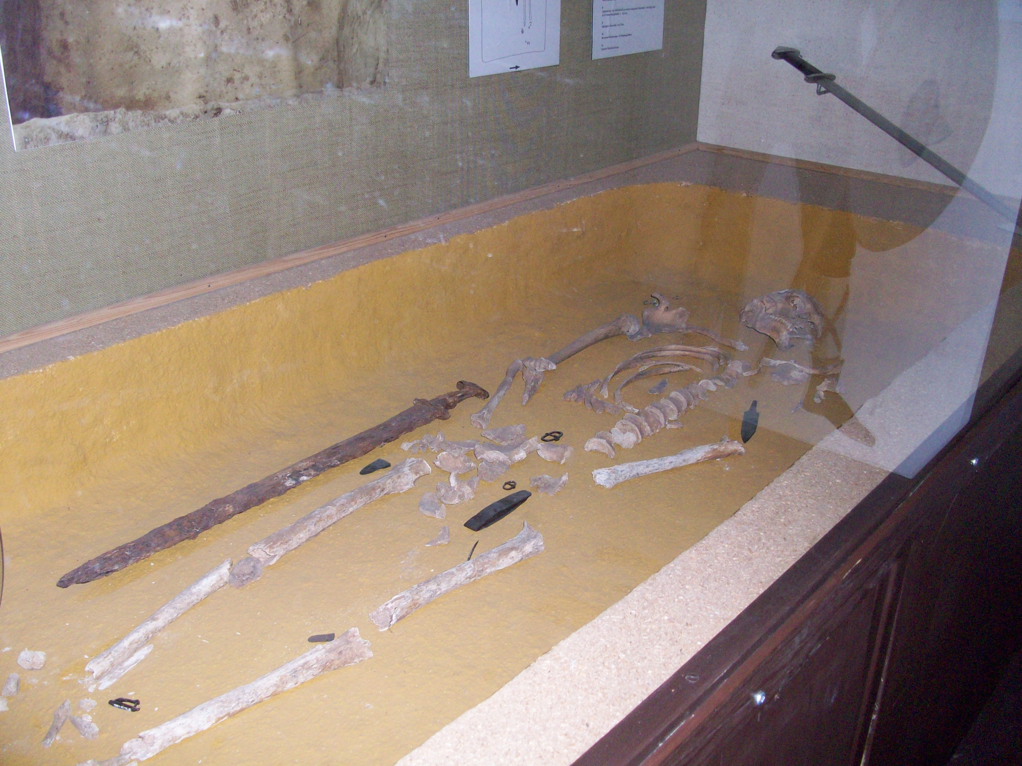 Das 1993 ausgegrabene Skelett eines fränkischen Kriegers mit Grabbeigaben im Groß-Umstädter Museum Gruberhof. Das Schwert ist eine Nachbildung. Der Schatten gehört zur Nachbildung eines römischen Legionärs.